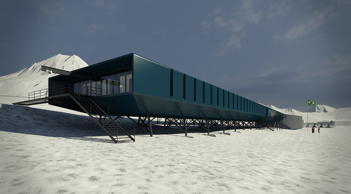 21/07/2014, Brasília - DF Fotos: Divulgação Marinha do Brasil